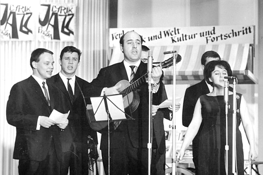 Zentralbild-Mittelstädt Bre-At. AV v. 1.11.65 Erfolgreiche Premier von "Lyrik-Jazz-Prosa" Mit begeistertem Applaus wurde die große Berliner Premiere von "Lyrik-Jazz-Prosa", der neuen Veranstaltungsserie des Verlages Volk und Welt-Kultur und Fortschritt, am 31.10.1965 aufgenomen. Die Doppelveranstaltung fand in der Kongreßhalle am Berliner Alexanderplatz anläßlich der "Woche des Buches" statt. Hier die Jazz-Optimisten mit Manfred Krug (Mitte) und Ruth Hohmann."